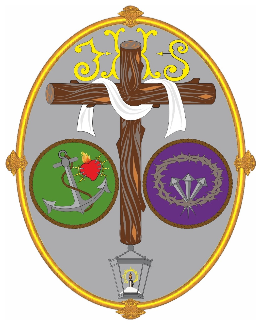 Escudo de la hermandad.